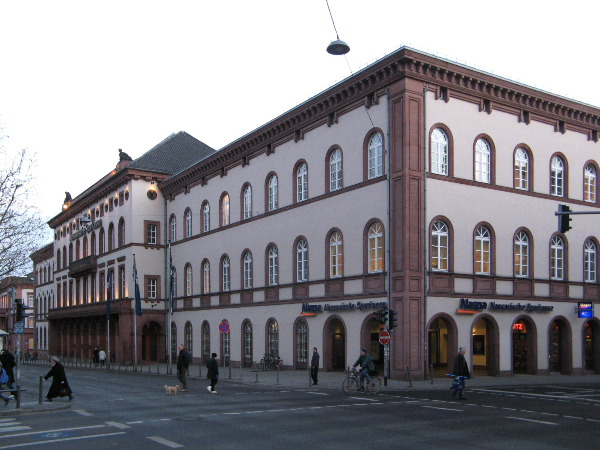 Stammsitz der Nassauischen Sparkasse Wiesbaden. Sie ist die Rechtsnachfolgerin der Landes-Credit-Casse Nassau (Naussauische Landesbank), deren Gründung am 22. Januar 1840 durch den Nassauischen Herzog Adolph erfolgte. Das Gebäude wurde noch vor der preußischen Annexion 1866 zwischen 1860 und 1863 unter Leitung des Wiesbadener Architekten Richard Görz nahezu zeitgleich mit dem ebenfalls von Görz erbauten Justizgebäude errichtet.